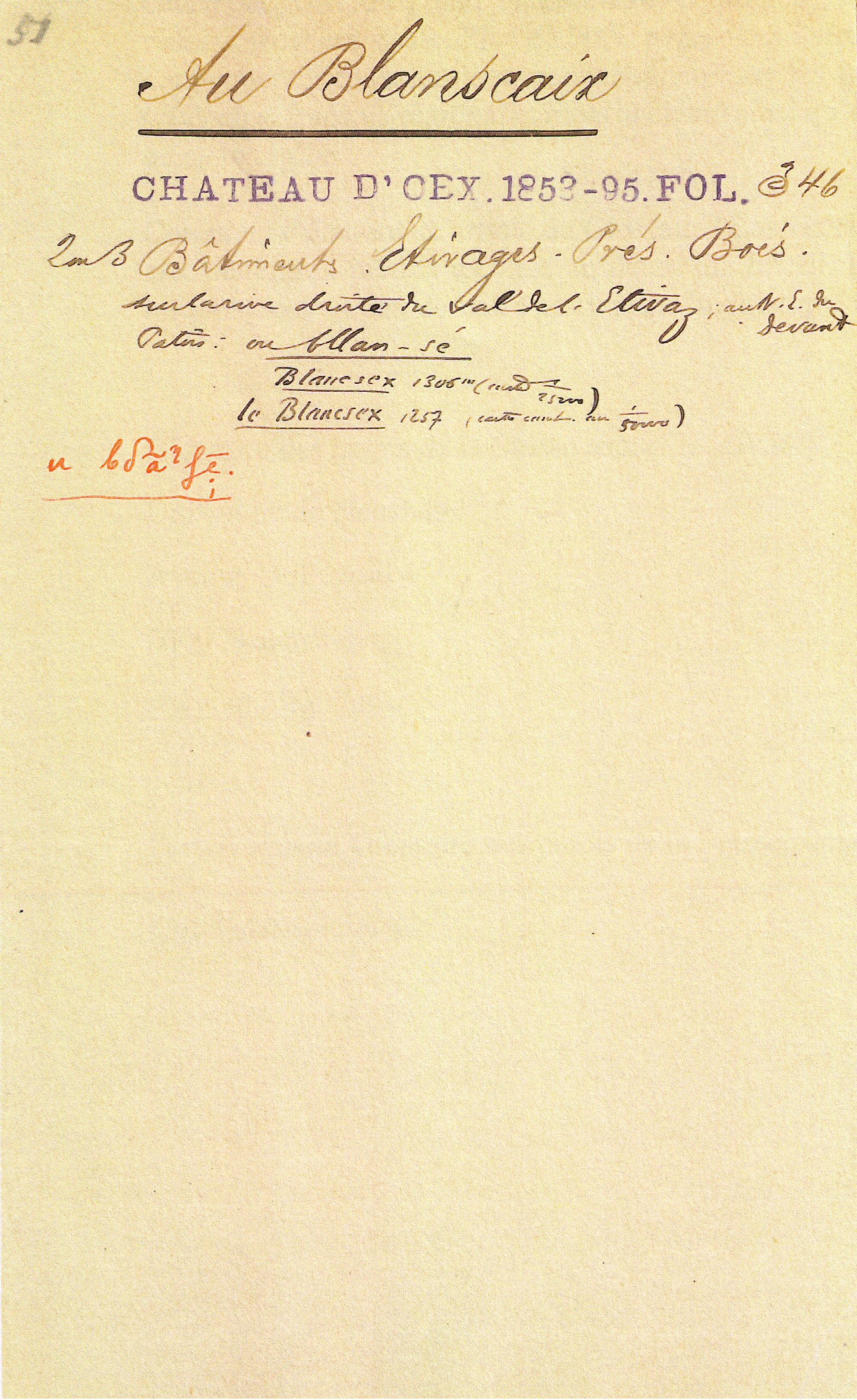 Exemple de fiche toponymique du fichier « Muret » au Glossaire des patois de la Suisse romande : « Au Blanscaix », lieu-dit de Chateau d'Oex.